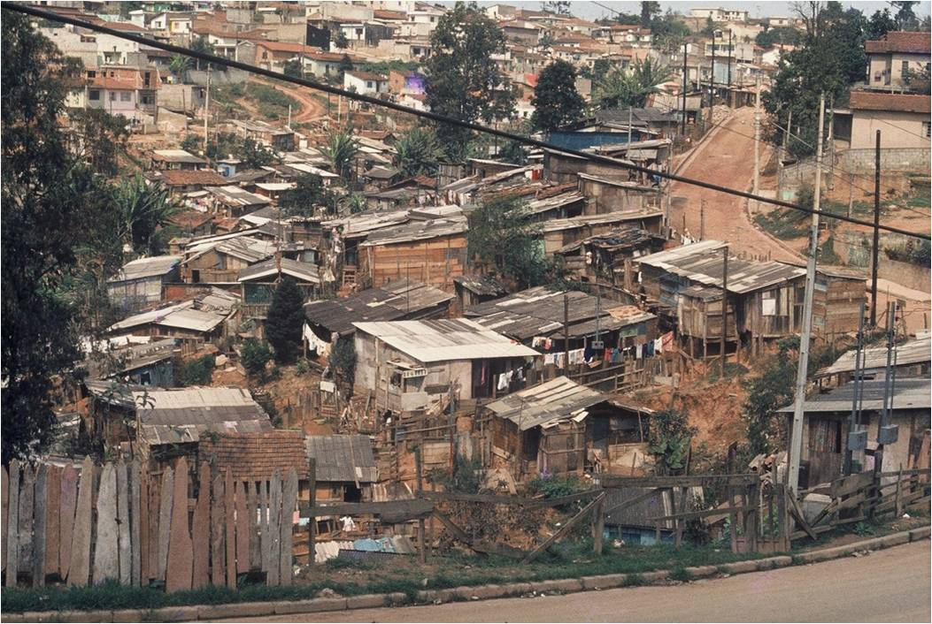 Die Favela Monte Azul, als Ute Craemer ihre Arbeit begonnen hat.